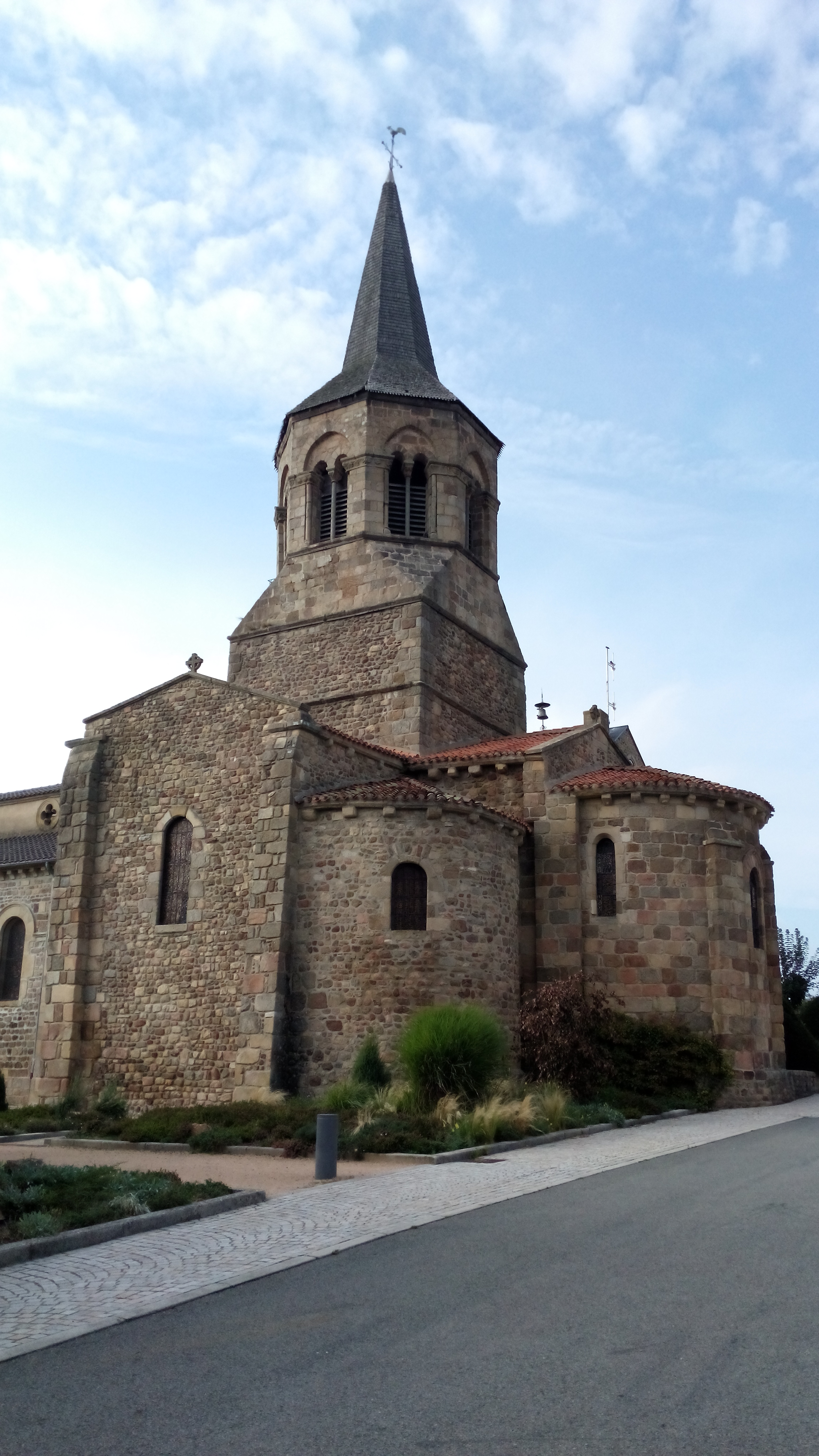 Église Notre-Dame de Marcillat en Combraille Exèdre et clocher .